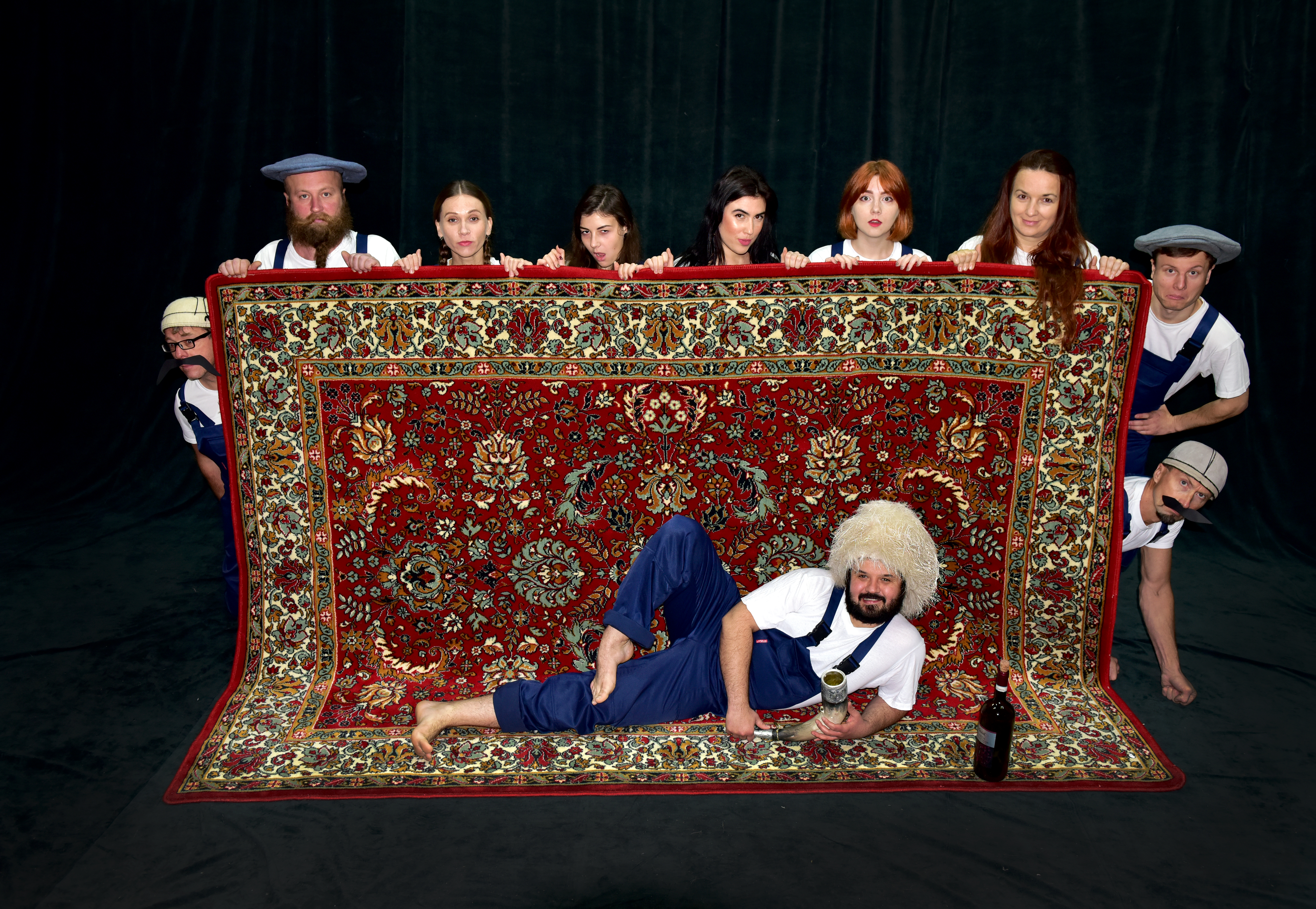 Вистава «Вражена Тетяна» за п’єсою грузинського драматурга Лаши Бугадзе. Театр абсурду.